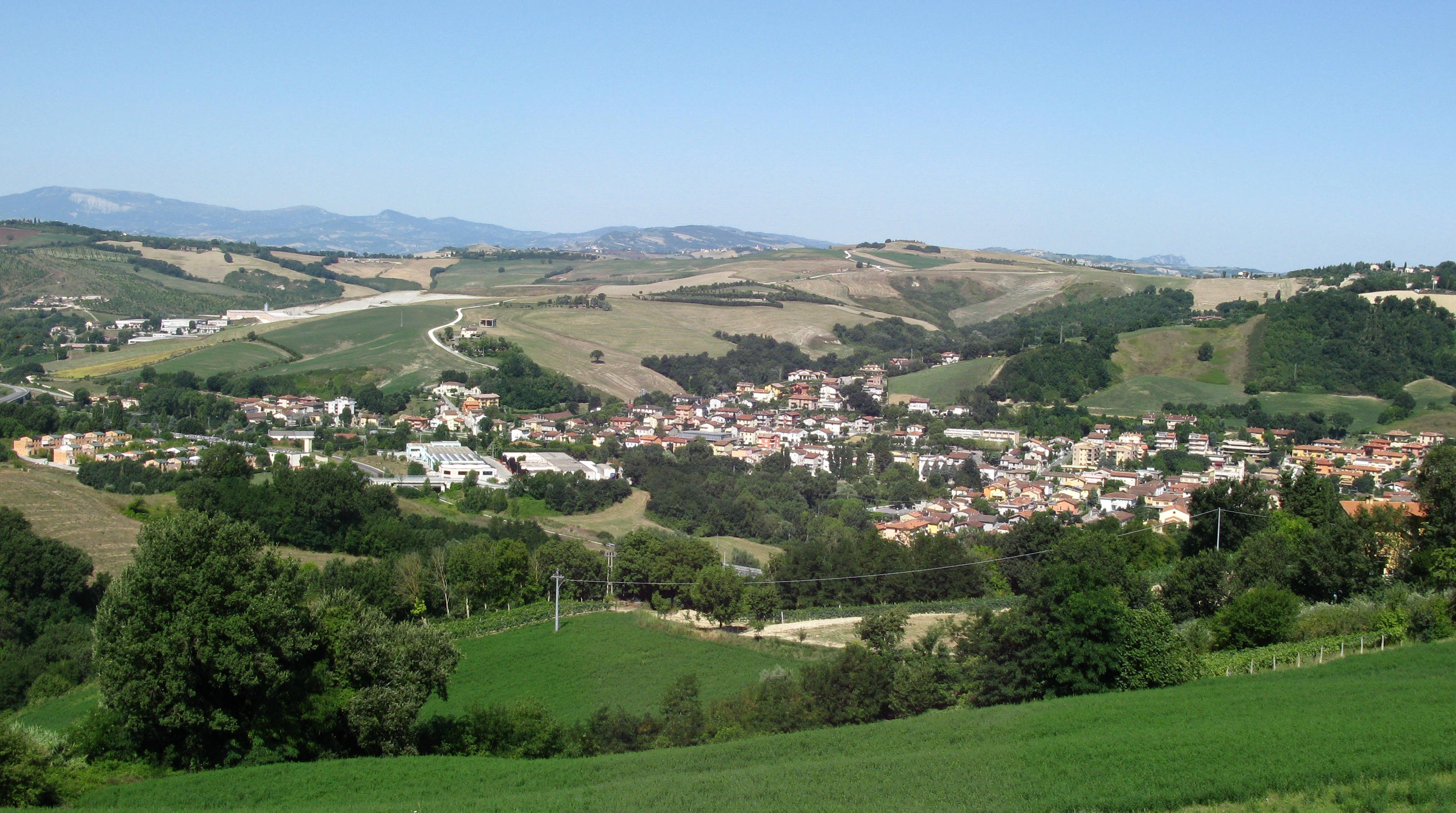 Panorama di Gallo frazione di Petriano.